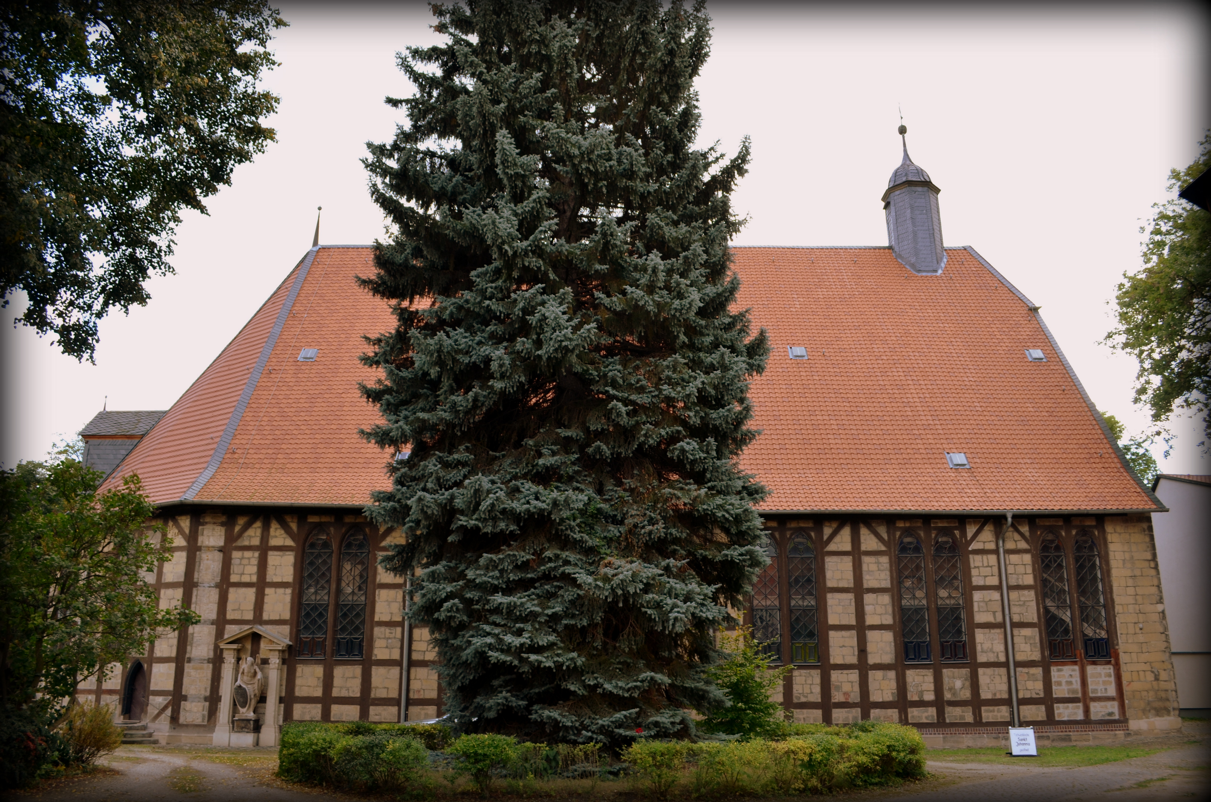 Halberstadt St Johannis Overzicht